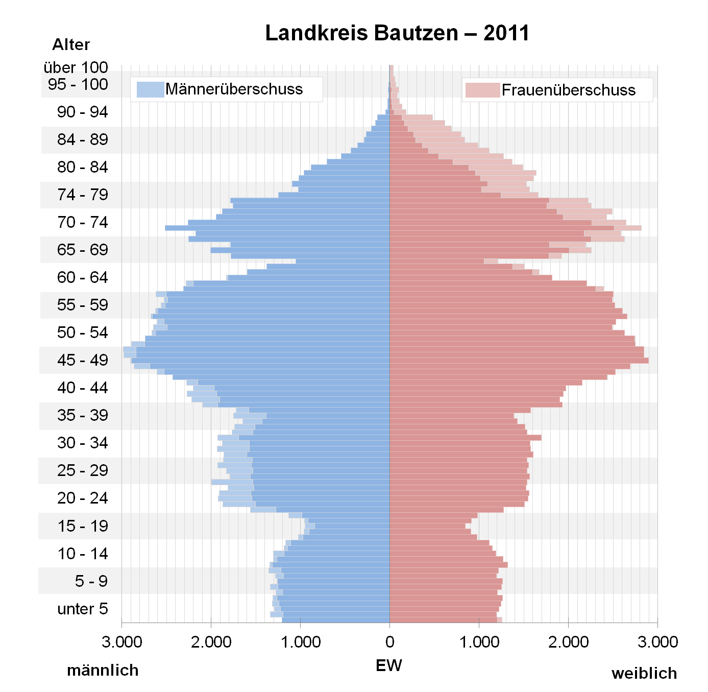 Bevölkerungspyramide des Landkreises Bautzen nach Zensus 2011.